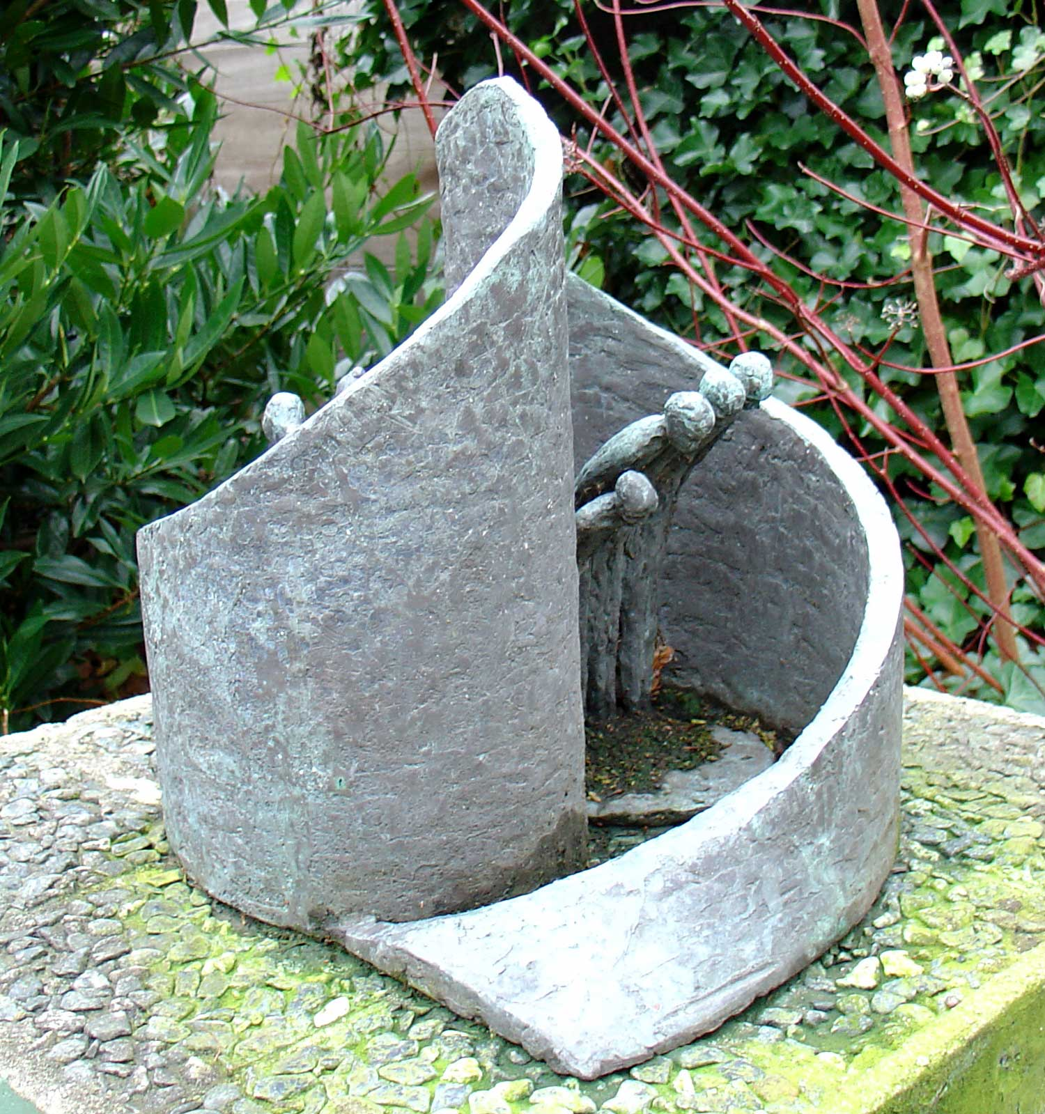 Ontwerp uit 1987 voor het Indisch monument door Rudi Augustinus geplaatst in de tuin van het Verzetsmuseum Gouda op 20 augustus 1994